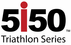 Logo 5150 Triathlon Series